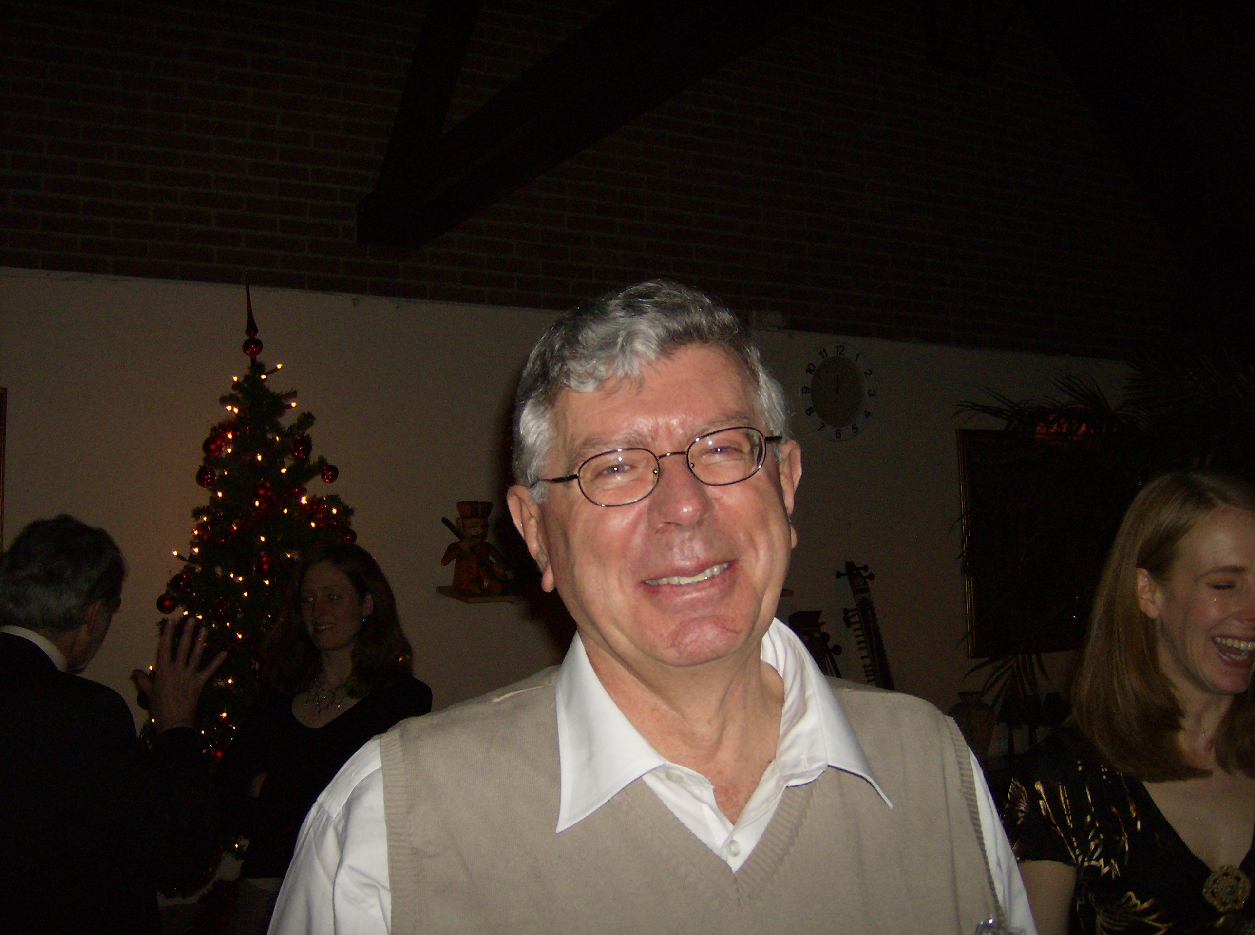 Made by Meursault2004 aka Revo Arka Giri Soekatno